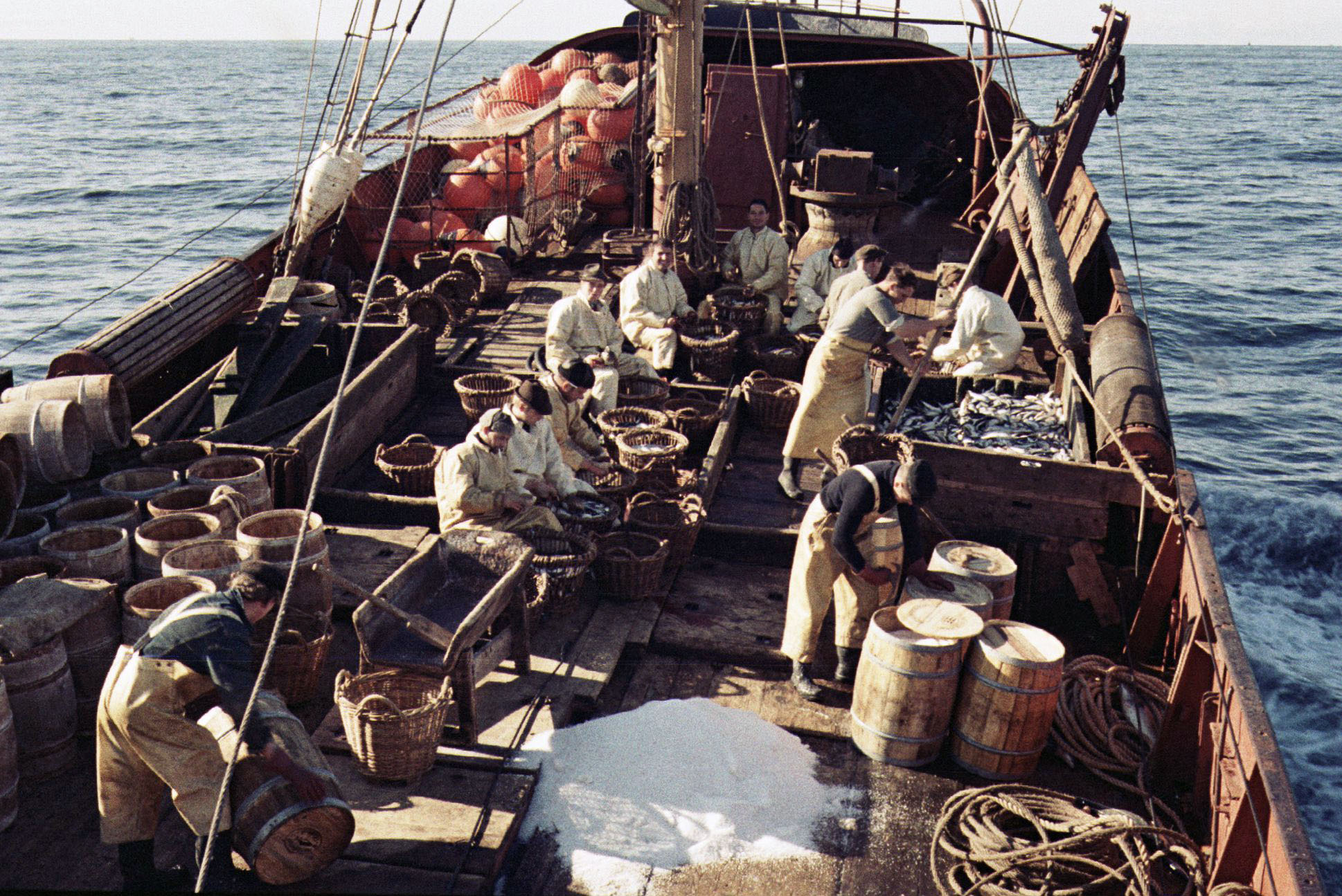 Motorlogger Saxnot SG7; Schlachten und Salzen der Heringe an Bord unmittelbar nach dem Fang